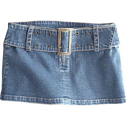 Microskirt